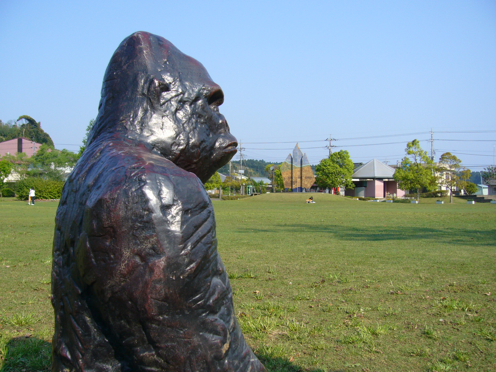 kurimoto-hureainosato-park3,katori-city,japan